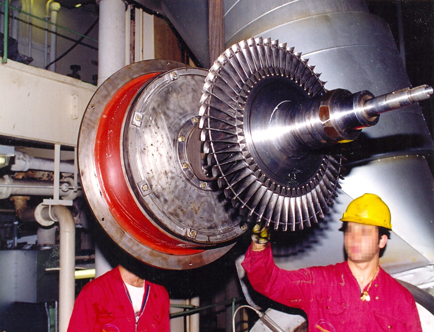 Turbocharger of a marine Diesel engine, turbine side